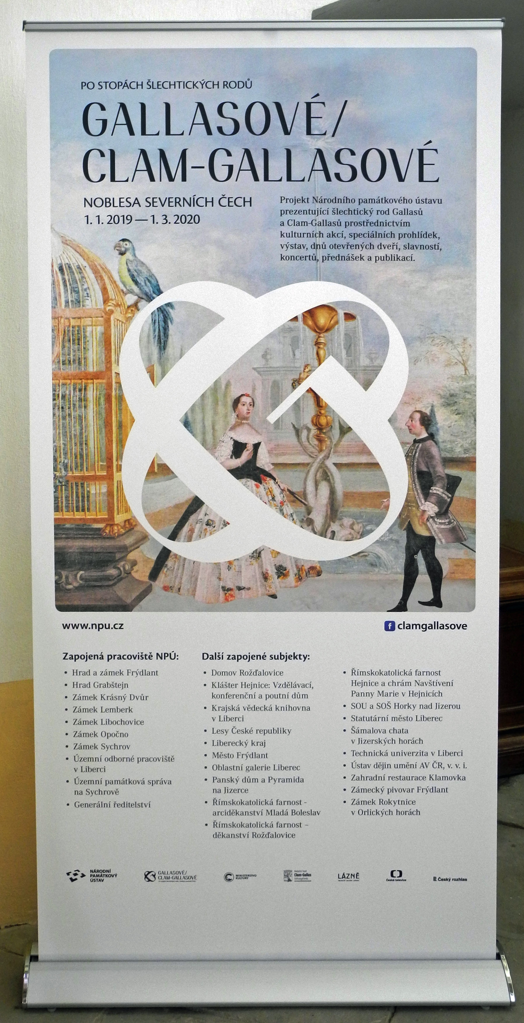 Plakat zum Ausstellungsprojekt "Auf den Spuren der Adelsgeschlechter Gallas und Clam-Gallas" 2019–2020. Das Ausstellungsprojekt der tschechischen Denkmalschutzbehörde (Národní památkový ústav – NPÚ): „Po stopách šlechtických rodů – Gallasové a Clam-Gallasové“ – Auf den Spuren der Adelsgeschlechter Gallas und Clam-Gallas findet in den folgenden Schlössern statt: Schloss Frýdlant Burg Grabštejn Schloss Lemberk Höhepunkt ist die Ausstellung „Gerechtigkeit ohne Angst“: Gallas und Clam-Gallas in der Tschechischen Republik vom 13. Dezember 2019 bis 1. März 2020 in der Reichenberger Nationagalerie (Oblastní galerie Liberec). Das Projekt steht unter der Schirmherrschaft des tschechischen Kulturministers Antonín Staněk und des Clam-Gallas Stiftungsfonds. Weitere beteiligte Partner sind: SchlossKrásný Dvůr Schloss Libochovice Schloss Opočno Schloss Sychrov Schloss Rožďalovice Kloster Hejnice Herrenhaus und Pyramide Jizerka (Klein Iser) Röm.-kath. Erzdekanat Mladá Boleslav Röm.-kath. Dekanat Rožďalovice Röm.-kath. Pfarrei und Wallfahrtskirche in Hejnice (Haindorf) Jagdschloss Nová Louka (Šámalova chata bei Bedřichov - Friedrichswald Schloss Rokytnice v Orlických horách (Rokitnitz i. Adlergebirge)